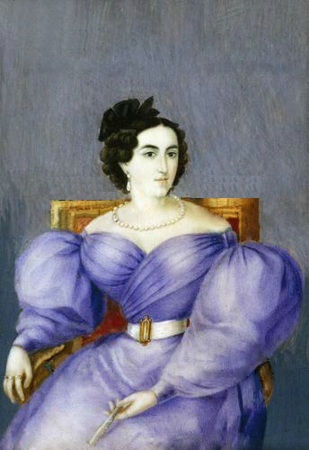 Retrato al óleo de la ilustrísima Marquesa de Solanda y Villarrocha, doña Mariana Carcelén y Larrea. Misma que fuera esposa del héroe independentista sudamericano Antonio José de Sucre, Gran Mariscal de Ayacucho.